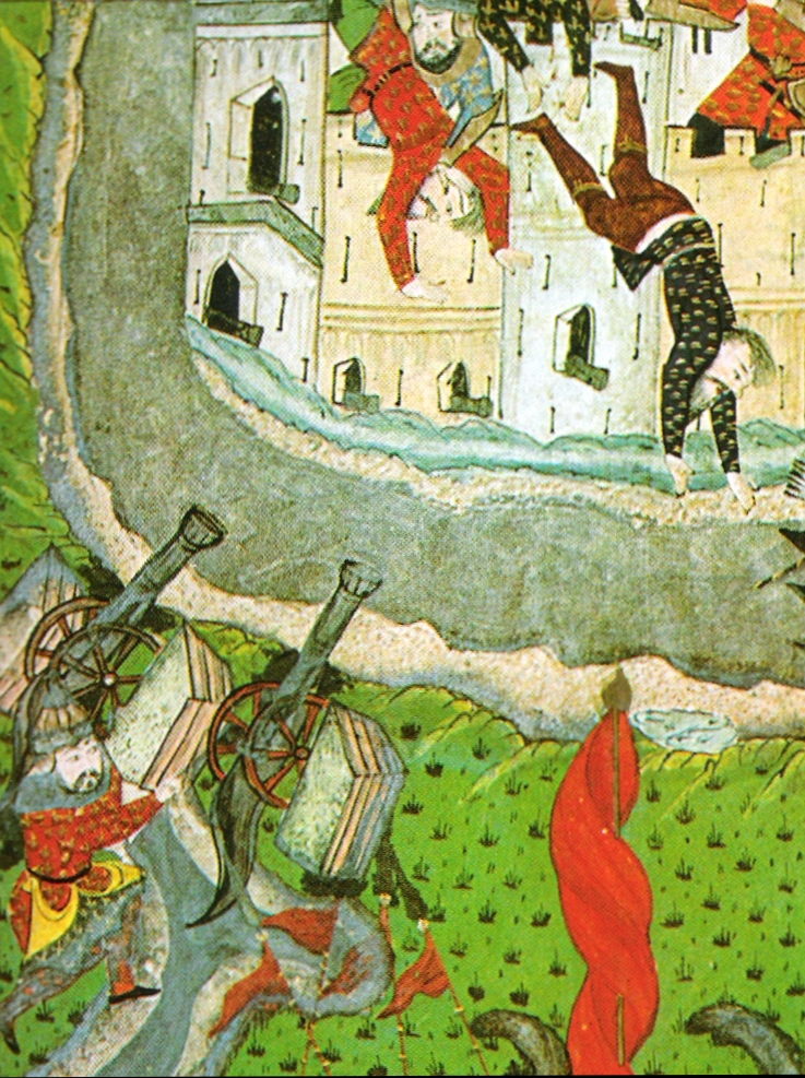 Ausschnitt aus einer osmanischen Miniatur: Topçu bei der erfolgreichen osmanischen Belagerung von Becse im Jahre 1551